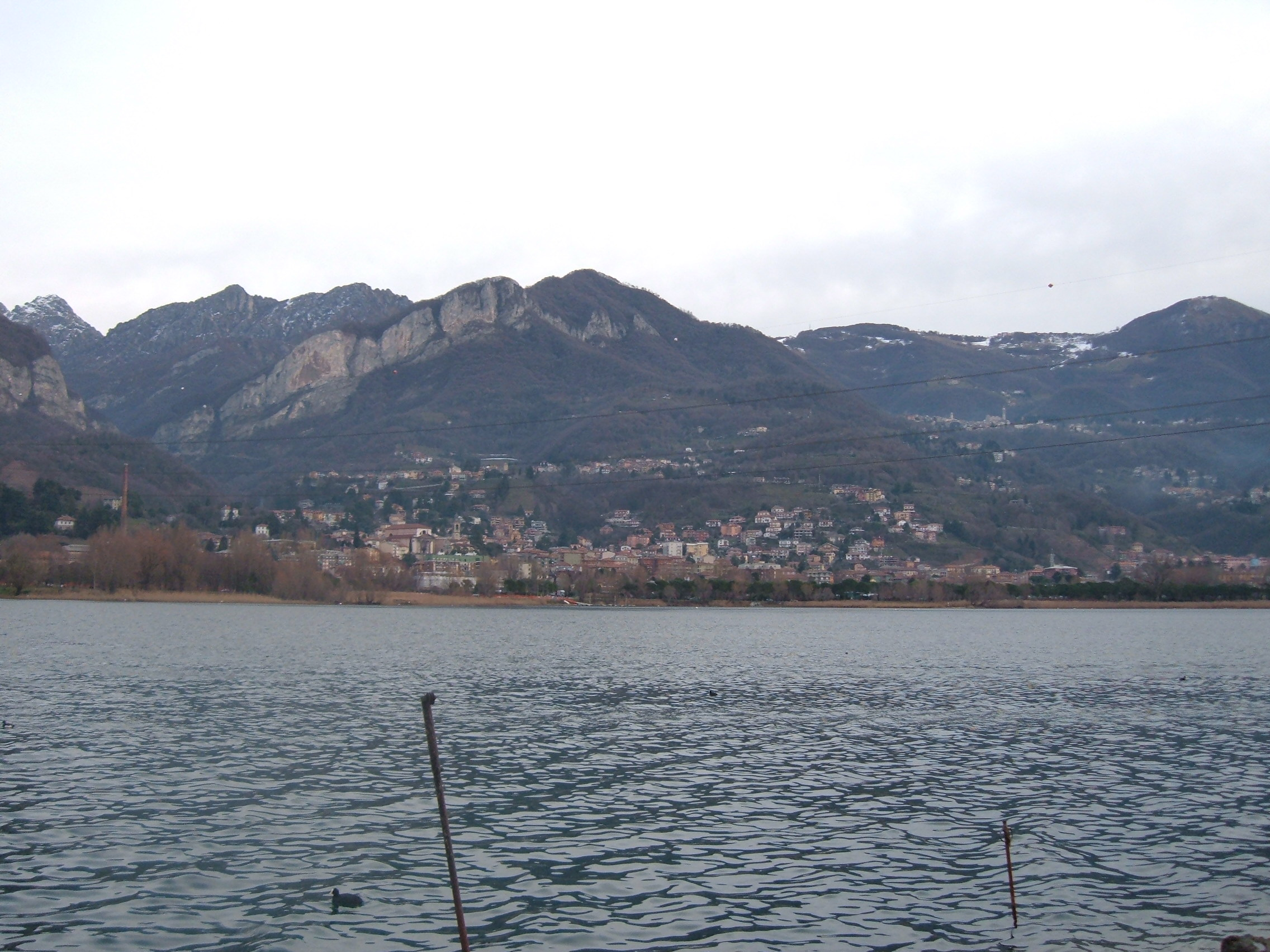 Lago di Olginate e Calolziocorte.